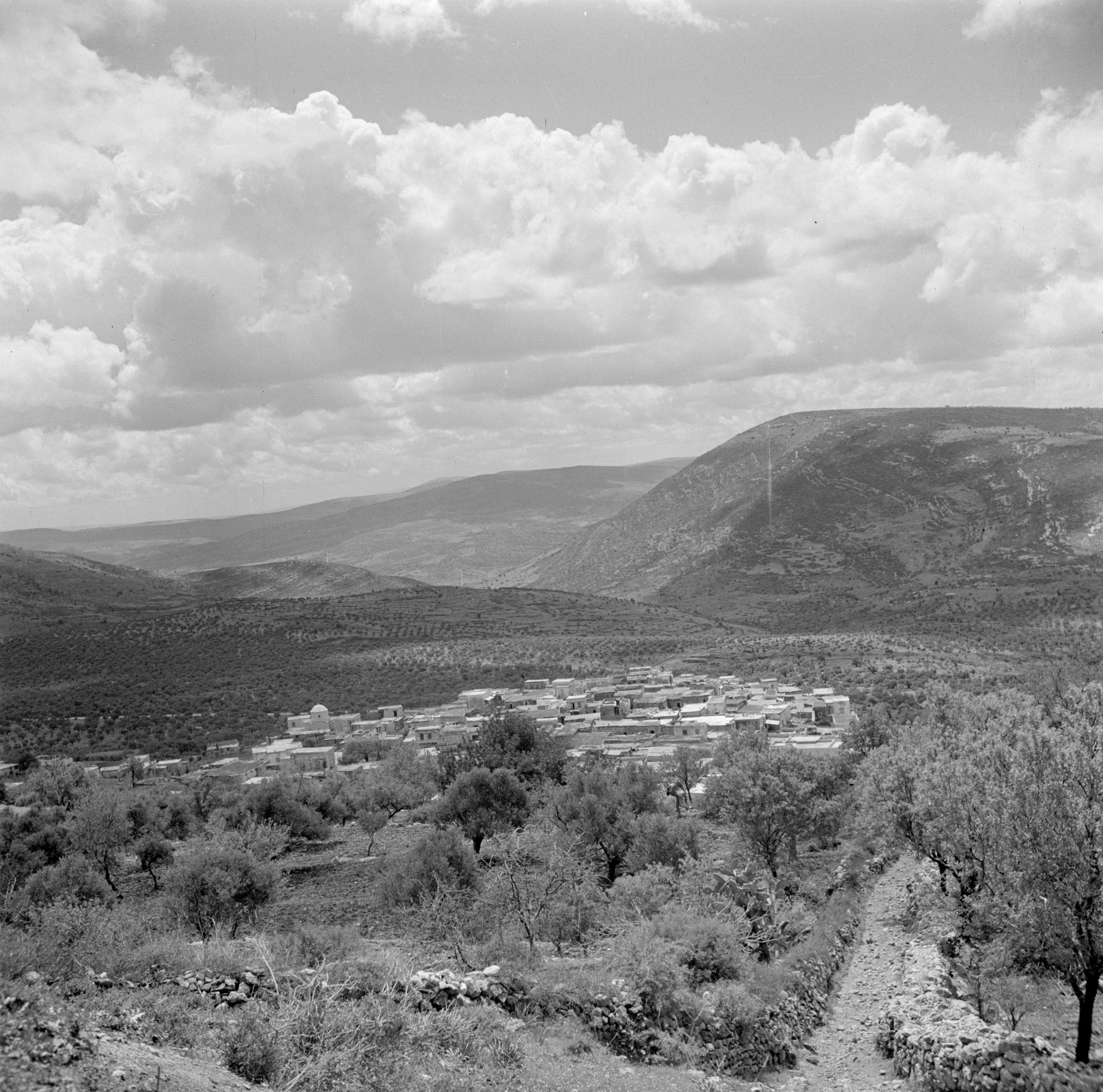 Collectie / Archief : Fotocollectie Van de Poll Reportage / Serie : Israël 1948-1949: Mag-del-Krum Beschrijving : Het dorp Mag-del-Krum met op de achtergrond de berg Tabor Annotatie : Het in Galilea gelegen dorp Mag-del-Krum, ook wel Majd al-Krum genoemd, is in 2003 opgegaan in de stad Shaghur (of: Shagor) Datum : 1948 Locatie : Galilea, Israël Trefwoorden : bergen, bomen, dorpen, panorama's Fotograaf : Poll, Willem van de, [onbekend] Auteursrechthebbende : Nationaal Archief Materiaalsoort : Negatief (zwart/wit) Nummer archiefinventaris : bekijk toegang 2.24.14.02 Bestanddeelnummer : 255-0833